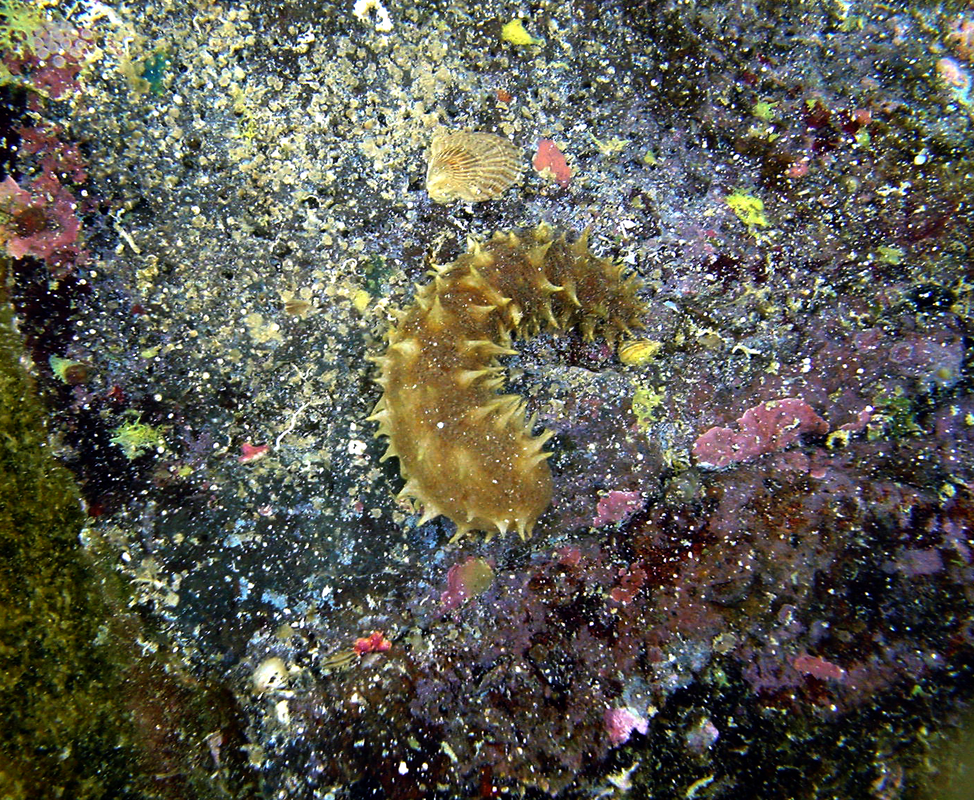 Sea cucumber in Kona, Hawaii